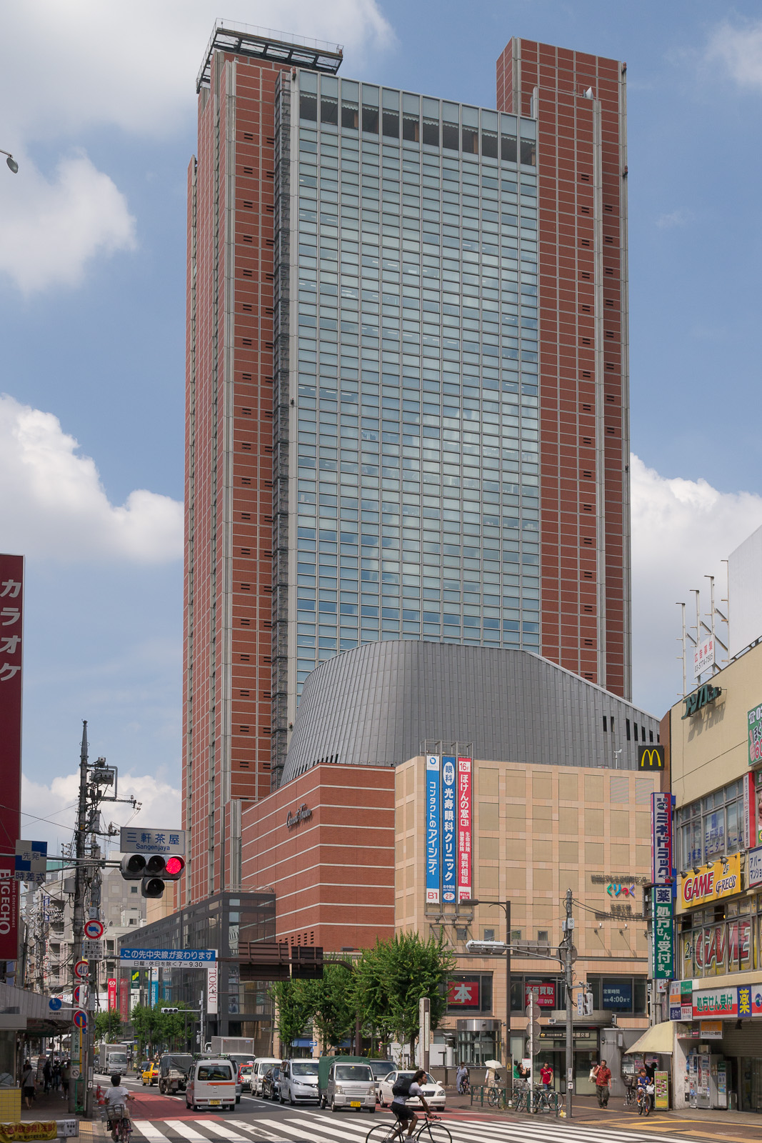 三軒茶屋キャロットタワー、東京都世田谷区太子堂。